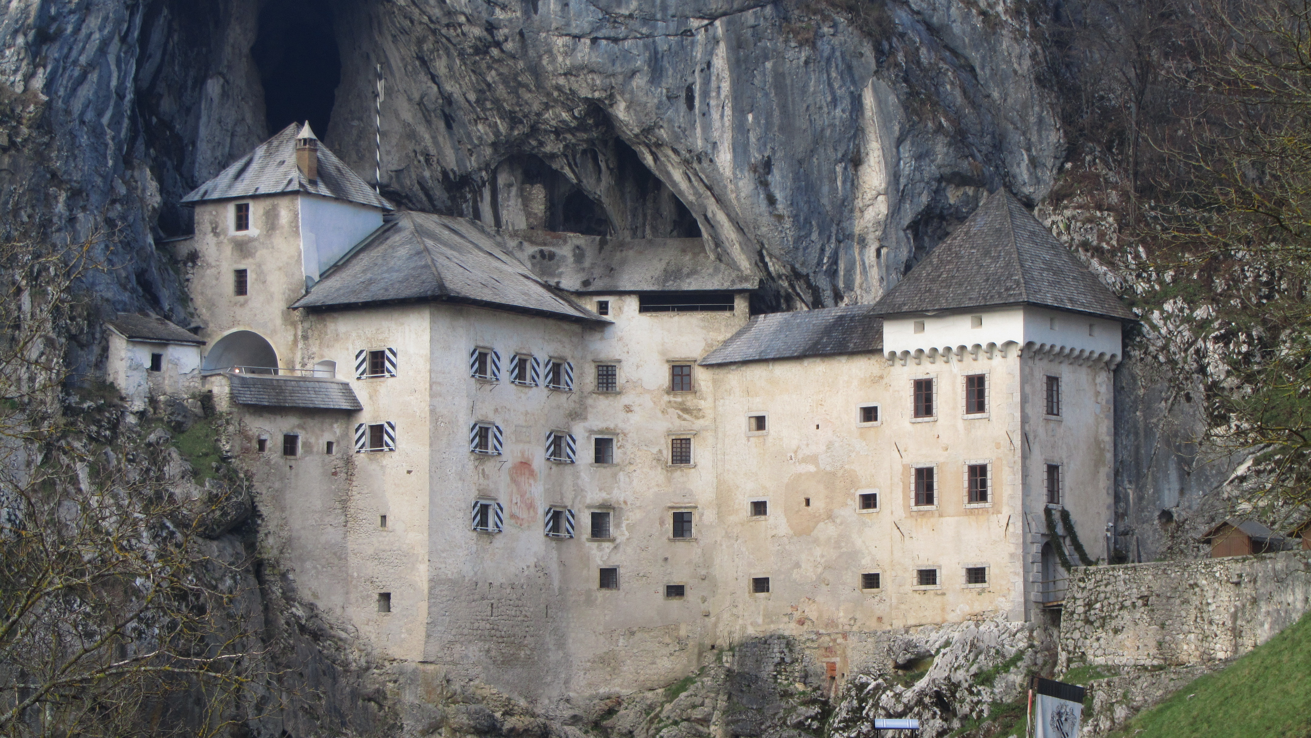 El Castillo de Predjama